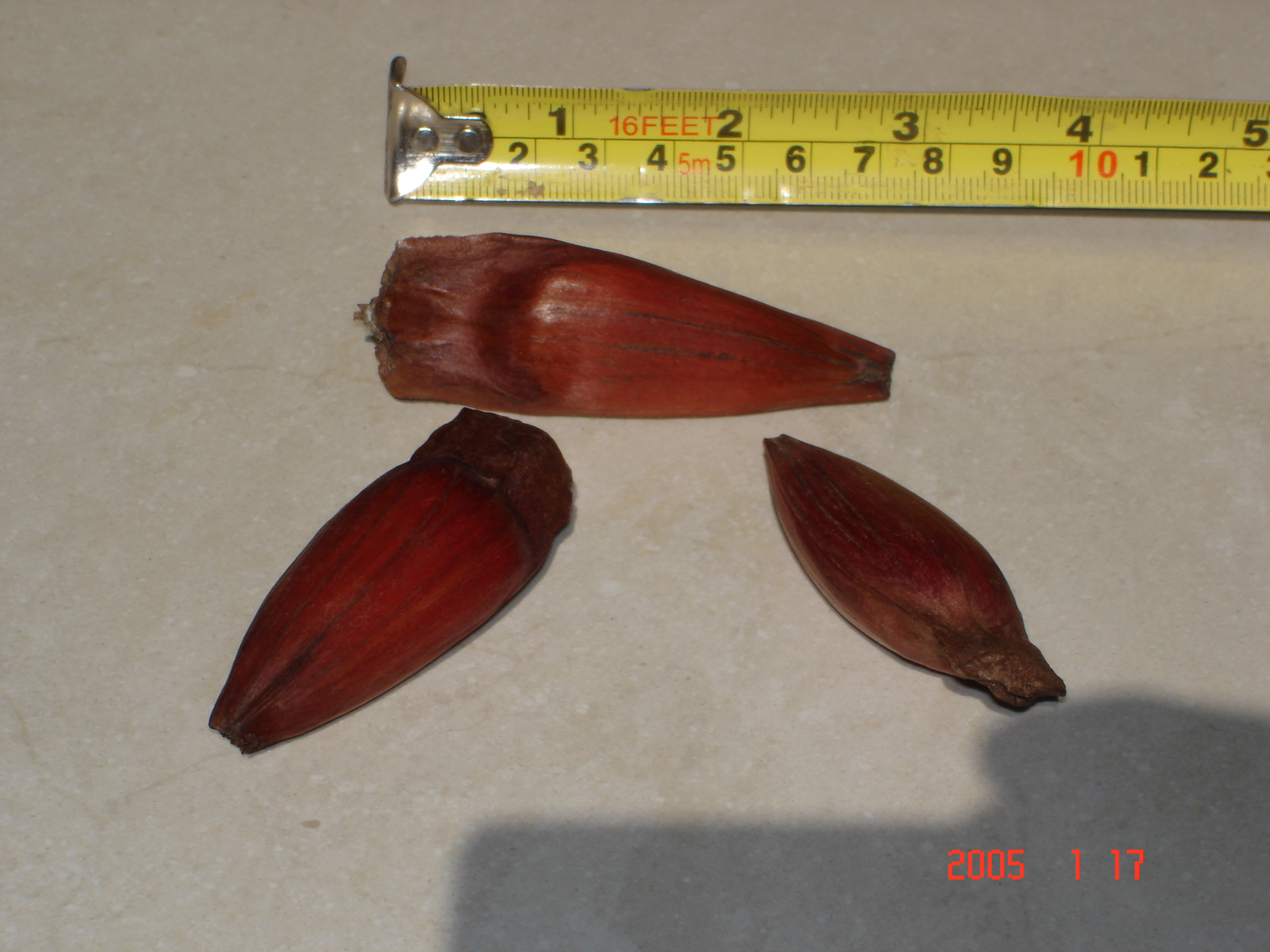 Pinhão semente de araucaria angustifolia - foto do usuário que fica licenciada